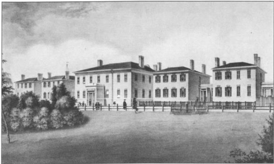 Upper Canada College